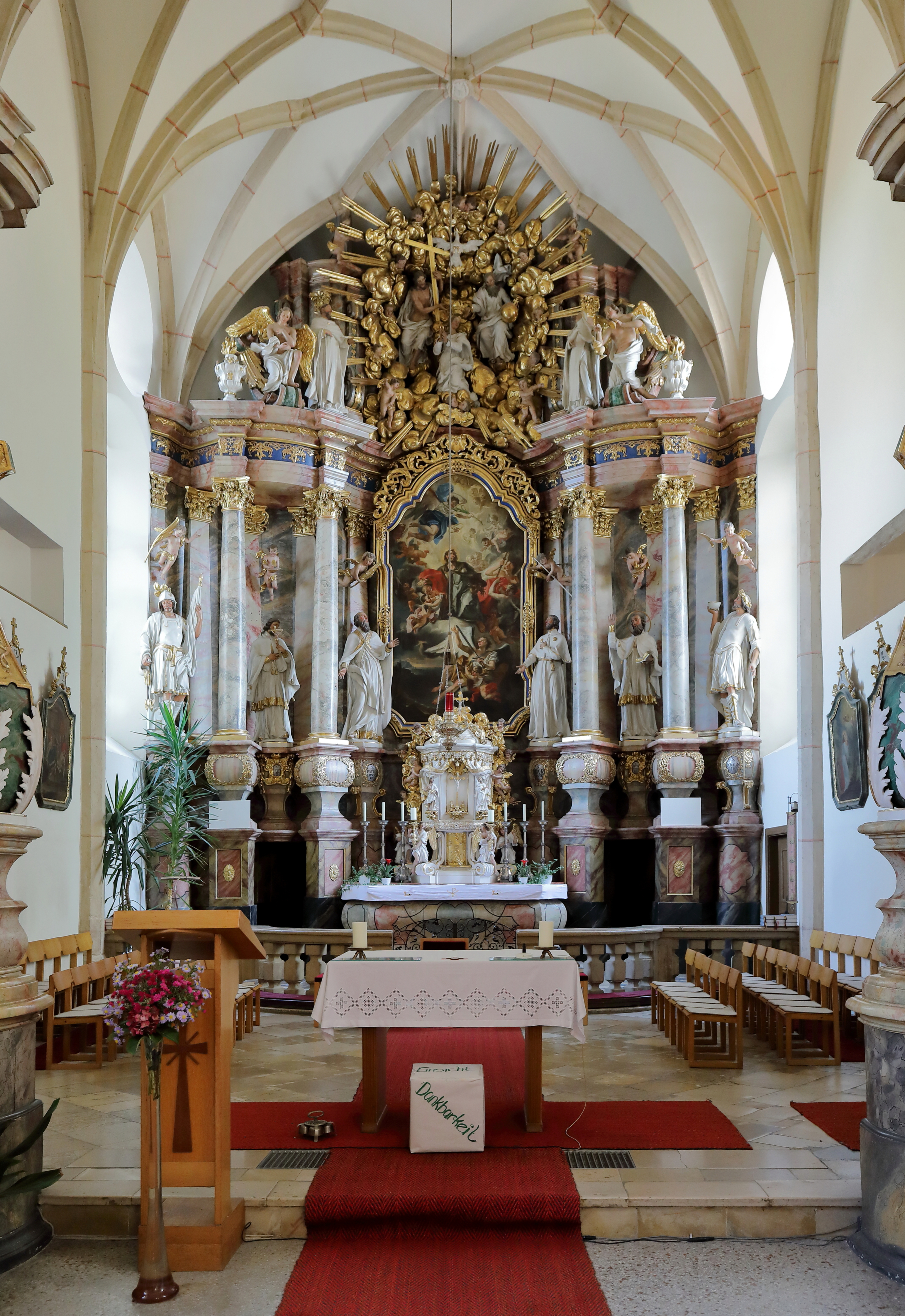 Der Hochaltar der röm.-kath. Pfarrkirche hl. Jakobus in der österreichischen Stadtgemeinde Friedberg in der Steiermark.Der Hochaltar wurde vom K.u.K. Hofarchitekten Mathias Steindl entworfen. Das Hochaltarbild aus dem Jahre 1733 zeigt die Himmelfahrt des Apostels Jakobus und wurde von Carl Unterhuber gemalt. Links und rechts des Altarbildes befinden sich je drei Heiligendarstellungen: Von links beginnend sind dies: hl. Florian, hl. Johannes Nepomuk, hl. Patrizius, hl. Franz Xaver, hl. Petrus Fourier und hl. Donatus.